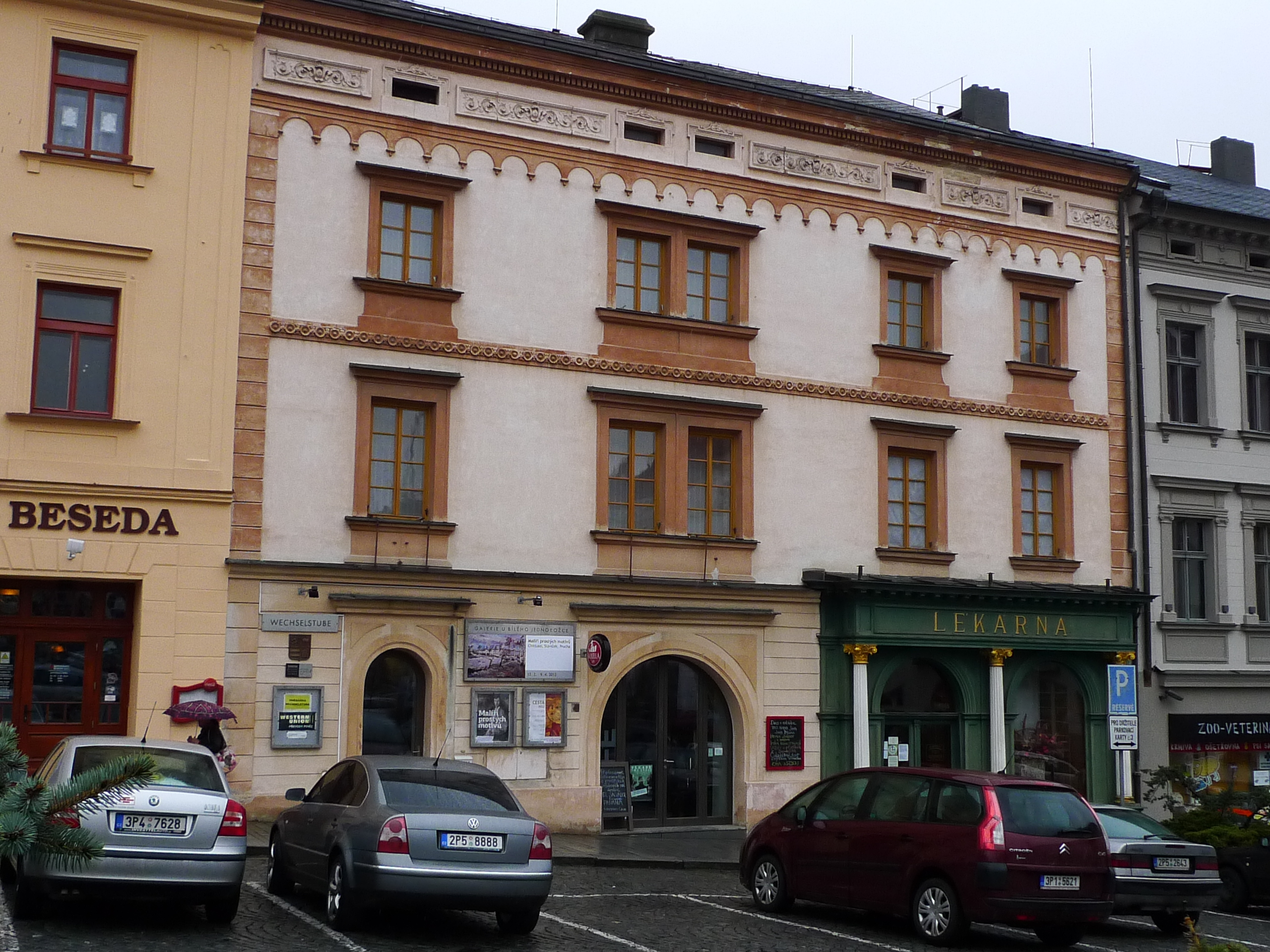 Lékárna U bílého jednorožce (Klatovy), nám. Míru 149, Klatovy